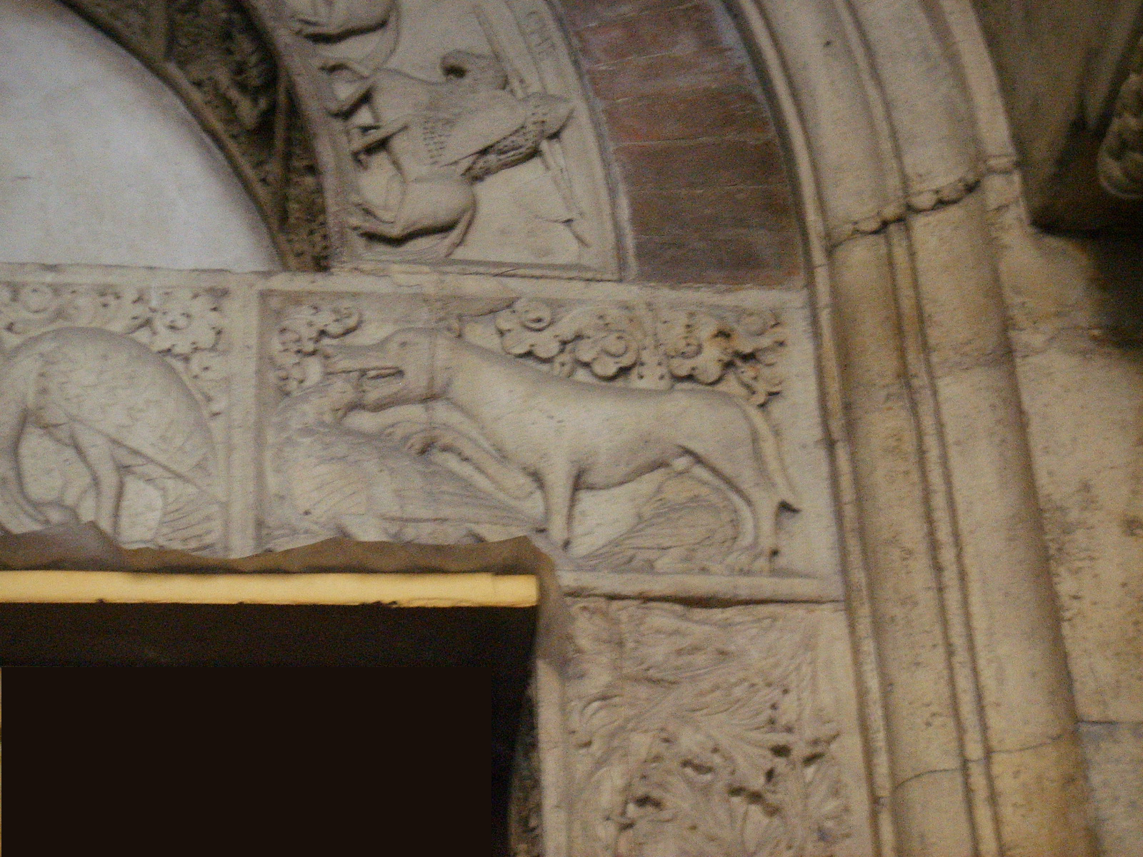 duomo di modena